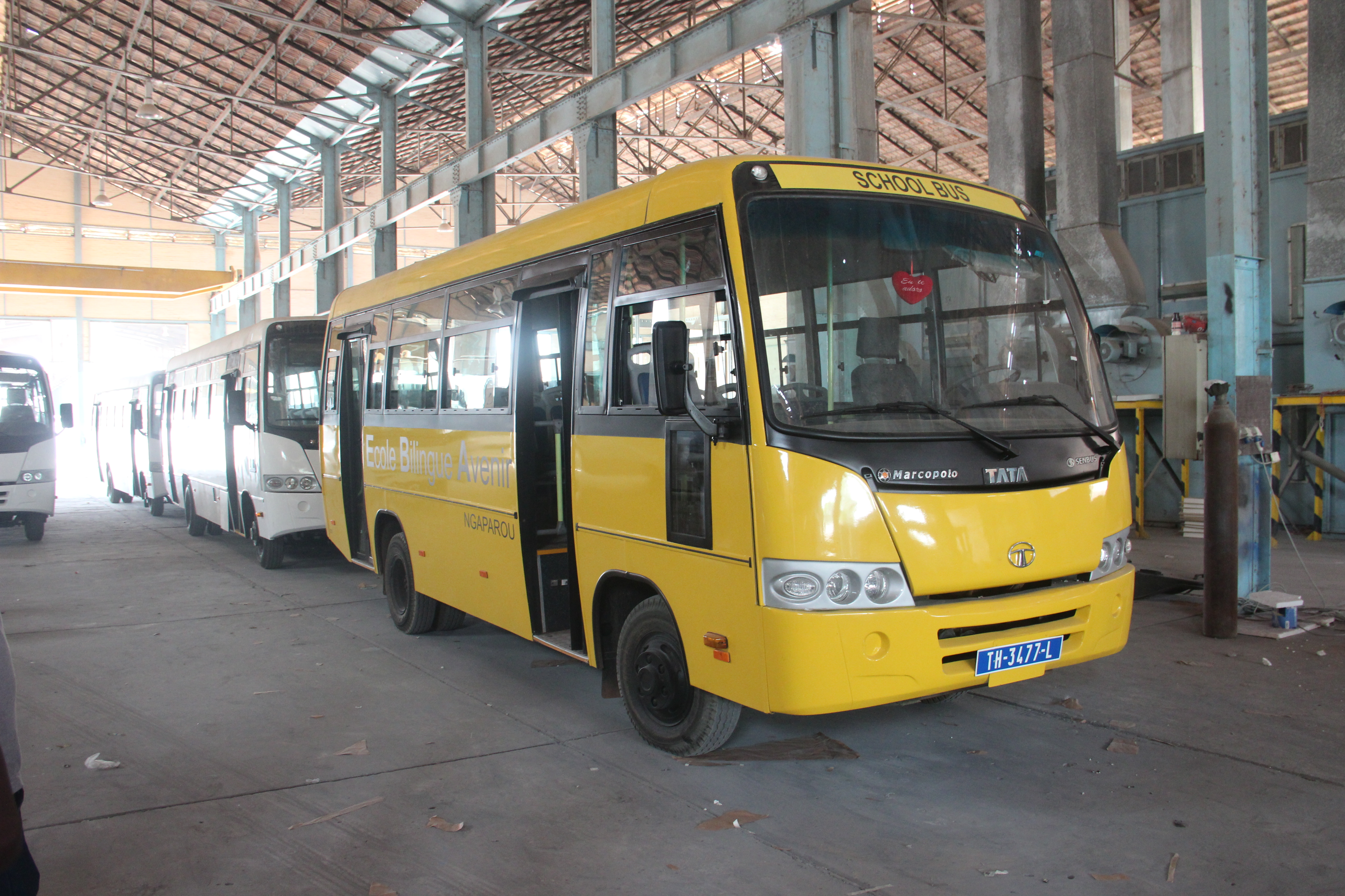 Bus scolaire pour l'école bilingue Avenir de Ngaparou, dans l'usine Senbus de Thiès. This is an image with the theme "Africa on the Move or Transport" from: Senegal